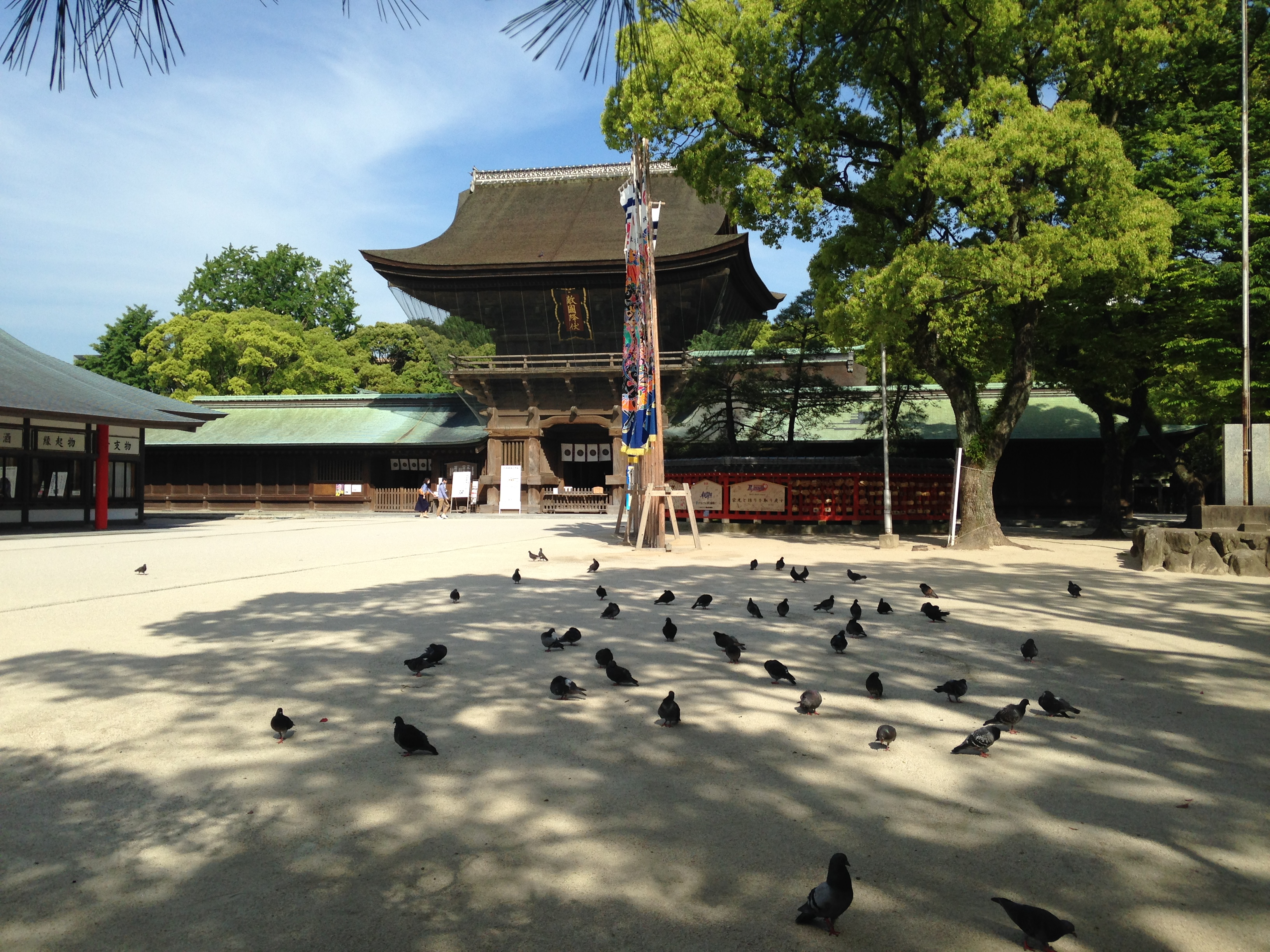 筥崎宮の楼門と境内のハト